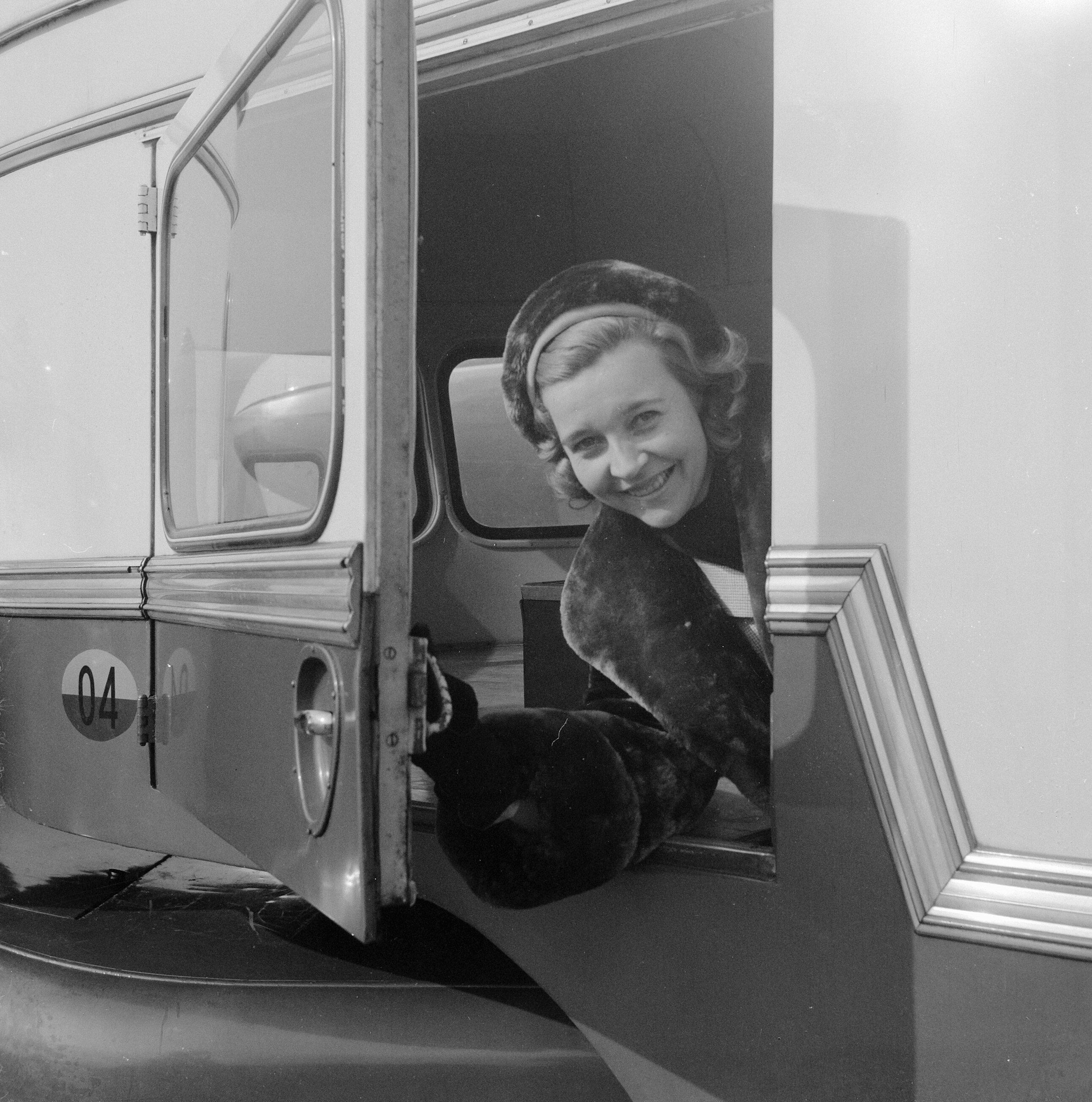 Aankomst Alice Babs (zweden) op Schiphol